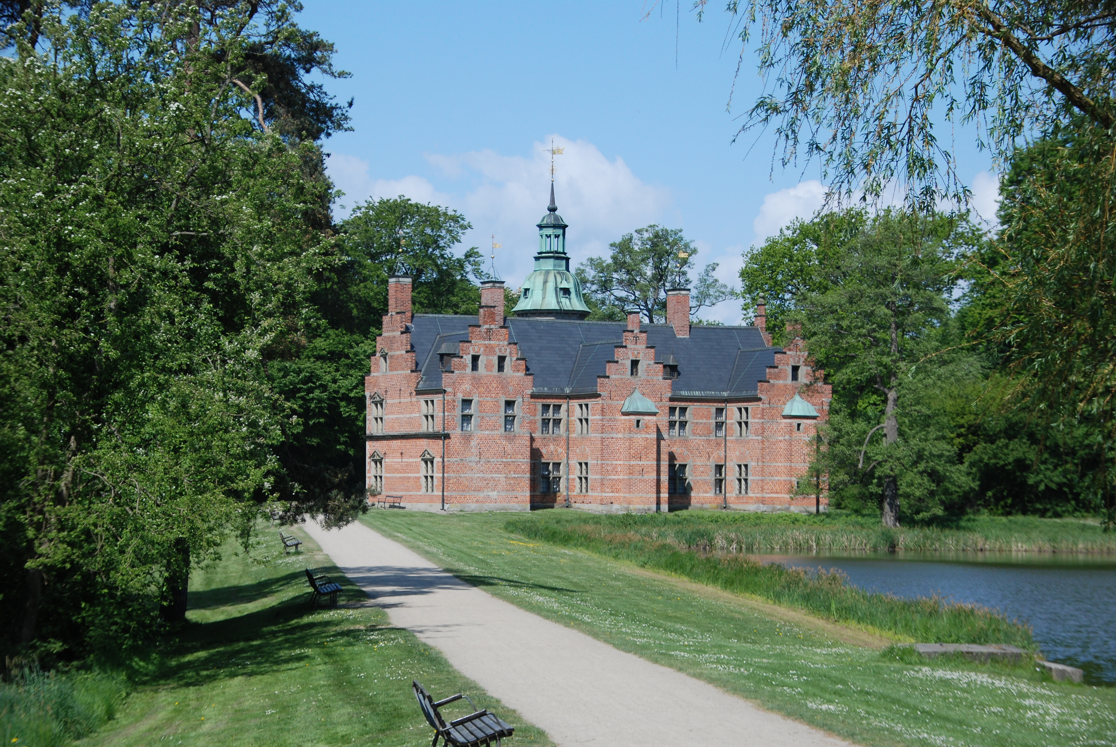 Badstueslottet at Frederiksborg Castle in Hillerød, Denmark